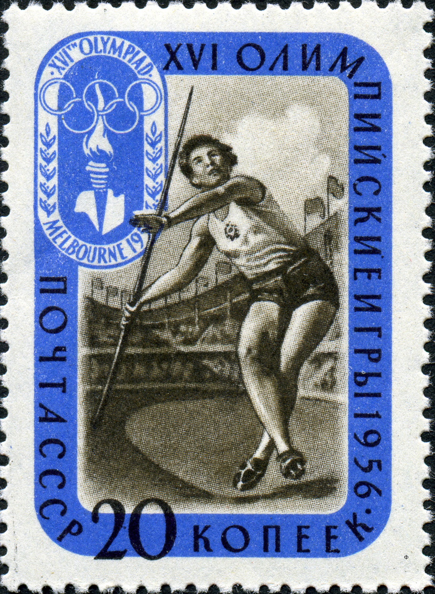 Марка СССР. Метание копья. ЦФА 2025